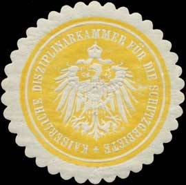 Sealing stamp Title: K. Disziplinarkammer für die Schutzgebiete Description: Place: size: 4 cm